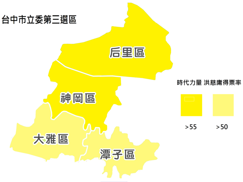 2016台中市第三選區立委各區得票率